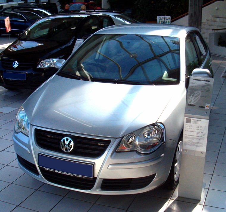 Volkswagen Polo 9N3/Facelift/GP - (Aufgenommen: September 2005)